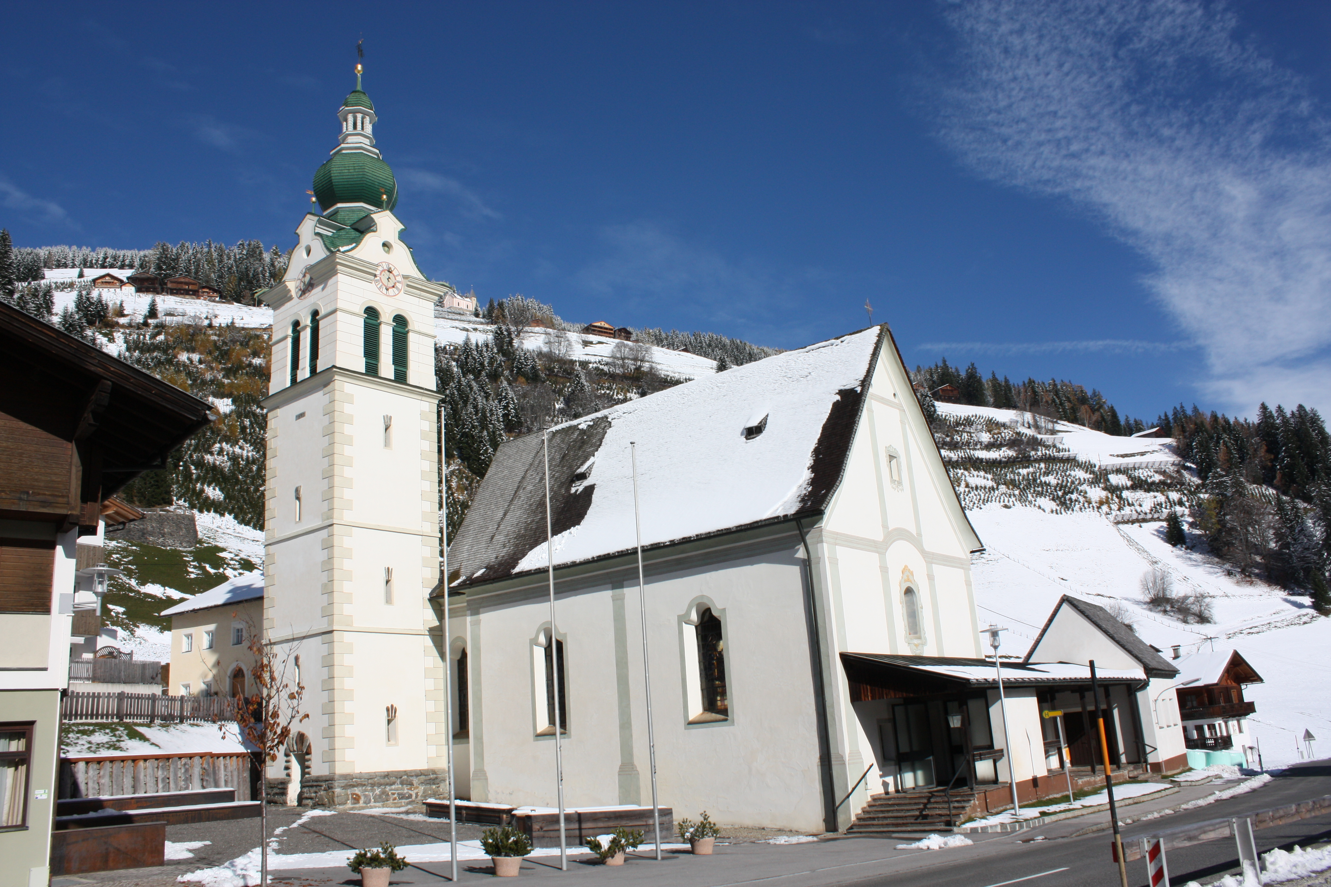 Kath. Pfarrkirche Hll. Florian, Ingenuin und Albuin